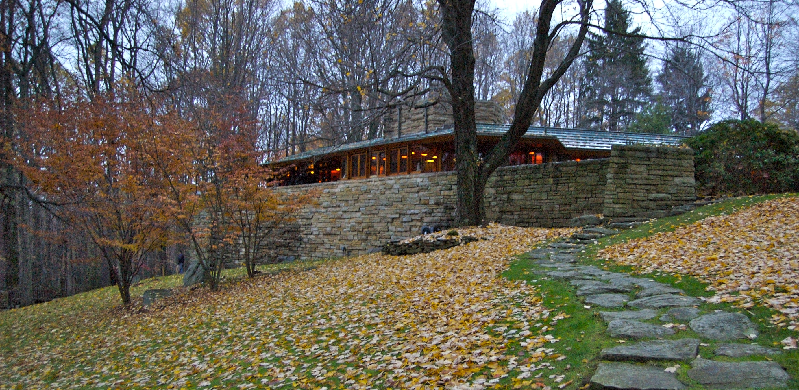 Kentuck Knob in Pennsylvania.